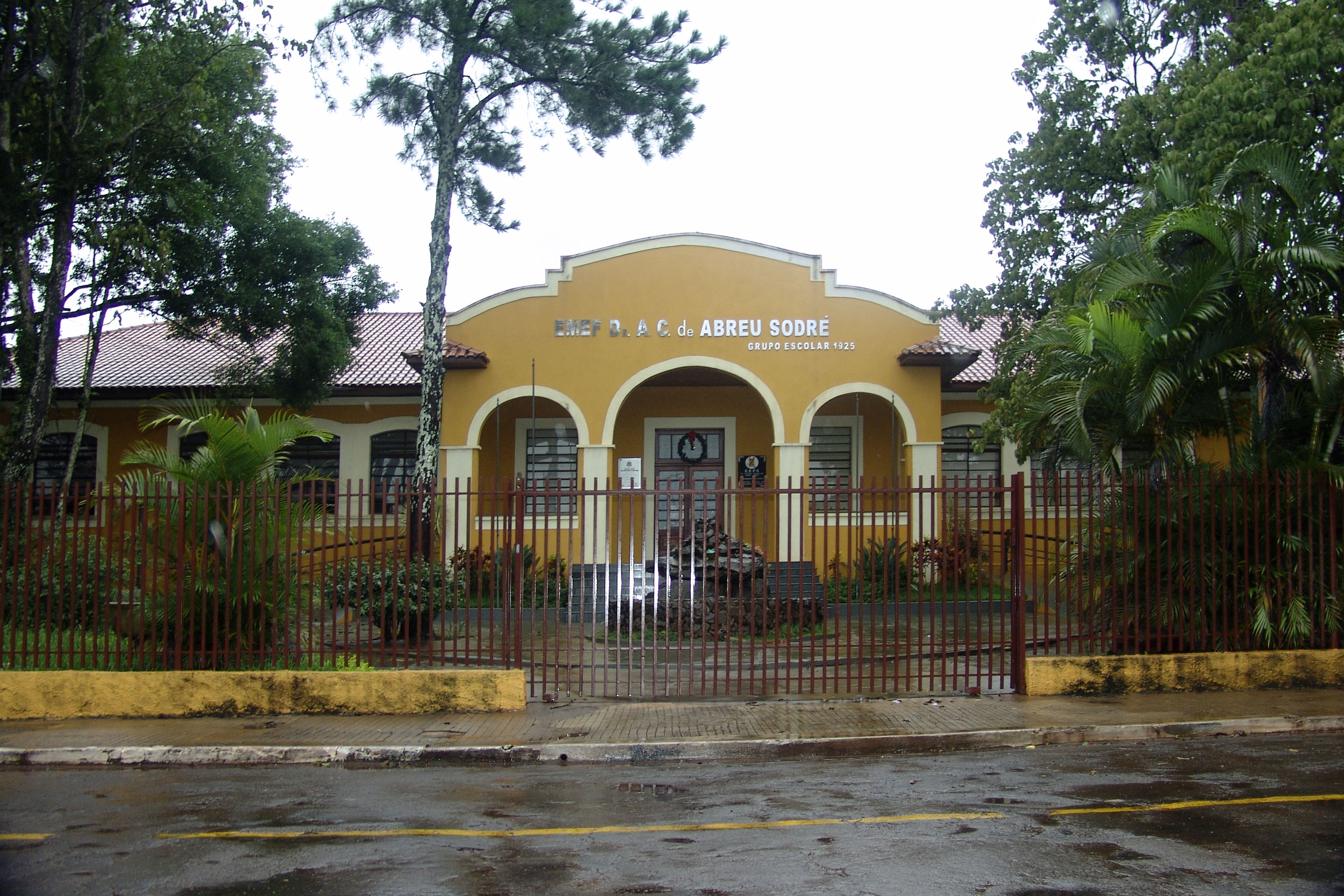 Escola no município de W:pt:Bernardino de Campos